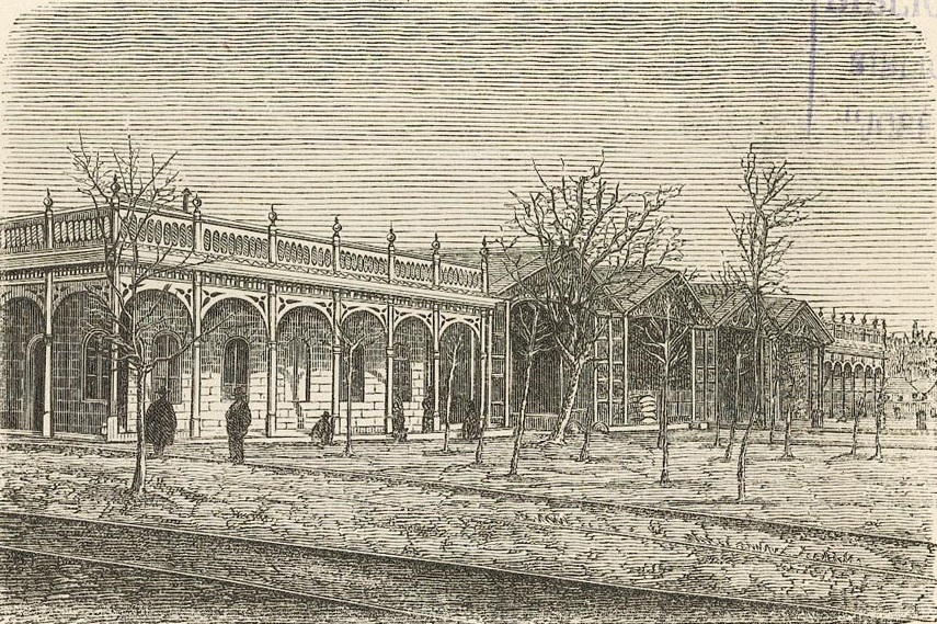 Santiago - Vista esterior de la estación de ferrocarriles (1872)